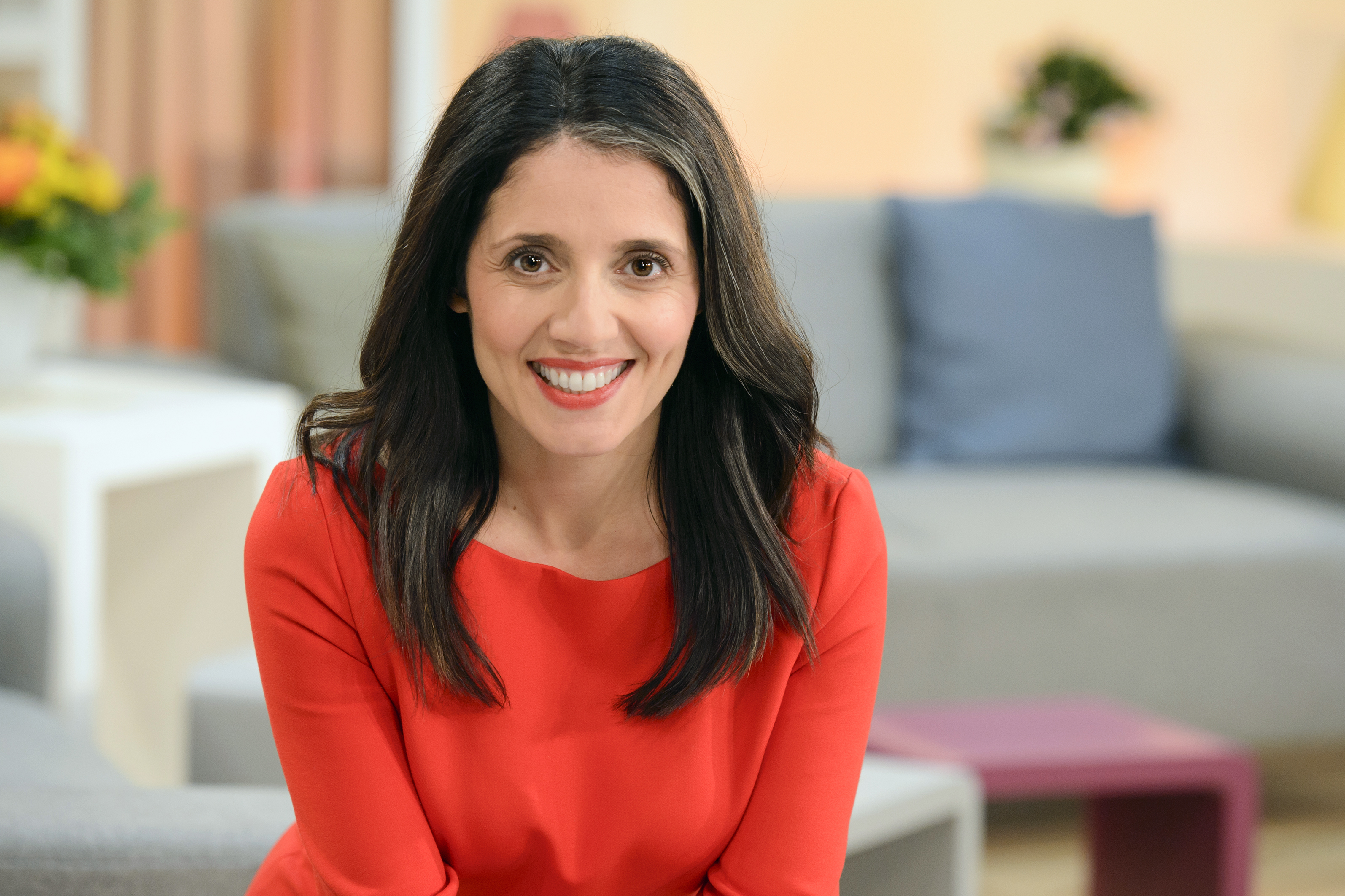 Selma Üsük, türkisch-deutsche Journalistin und Hörfunk- und Fernsehmoderatorin.